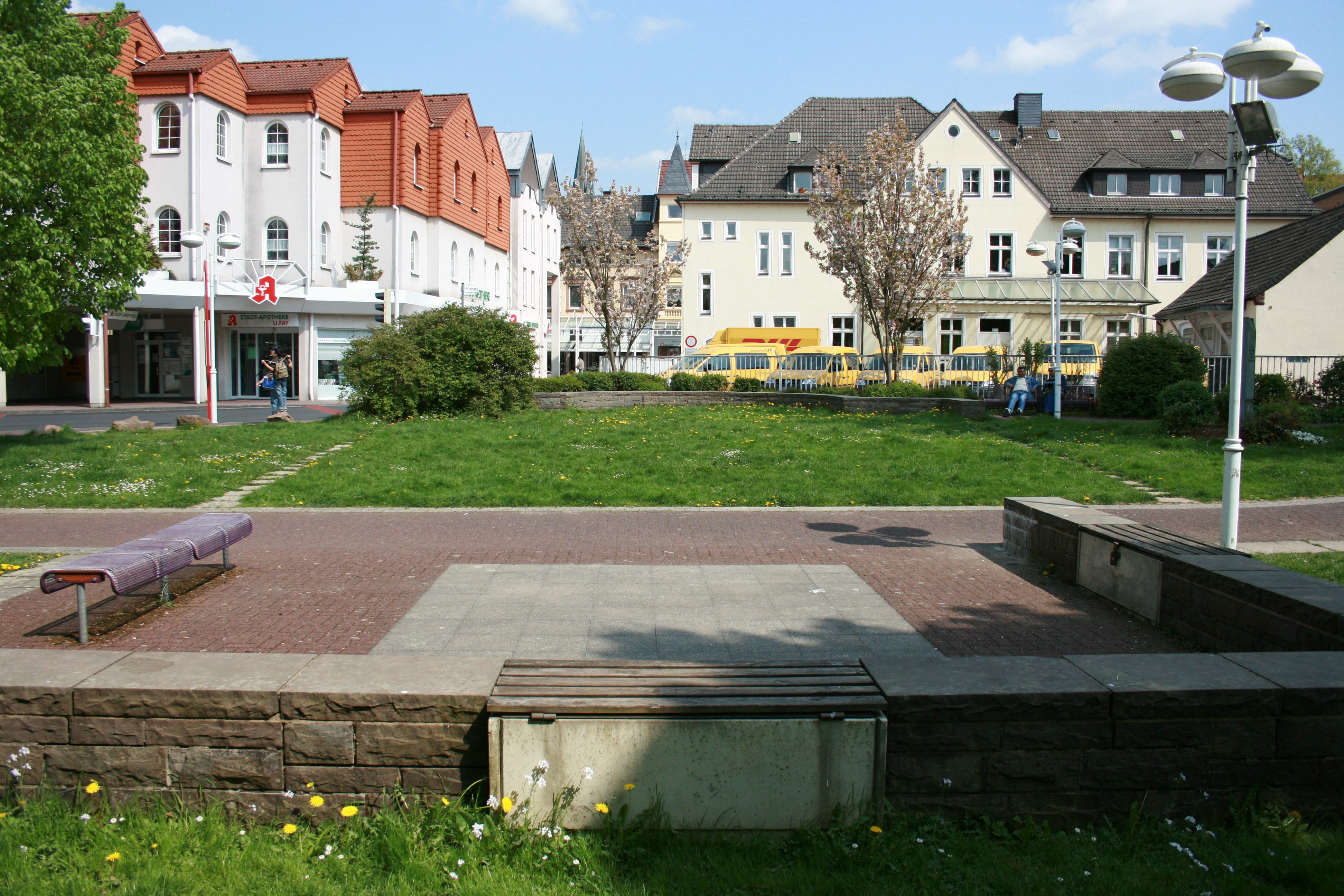 Ehemalige Kilianskirche auf dem Friedrich-Keßler-Platz in Werdohl